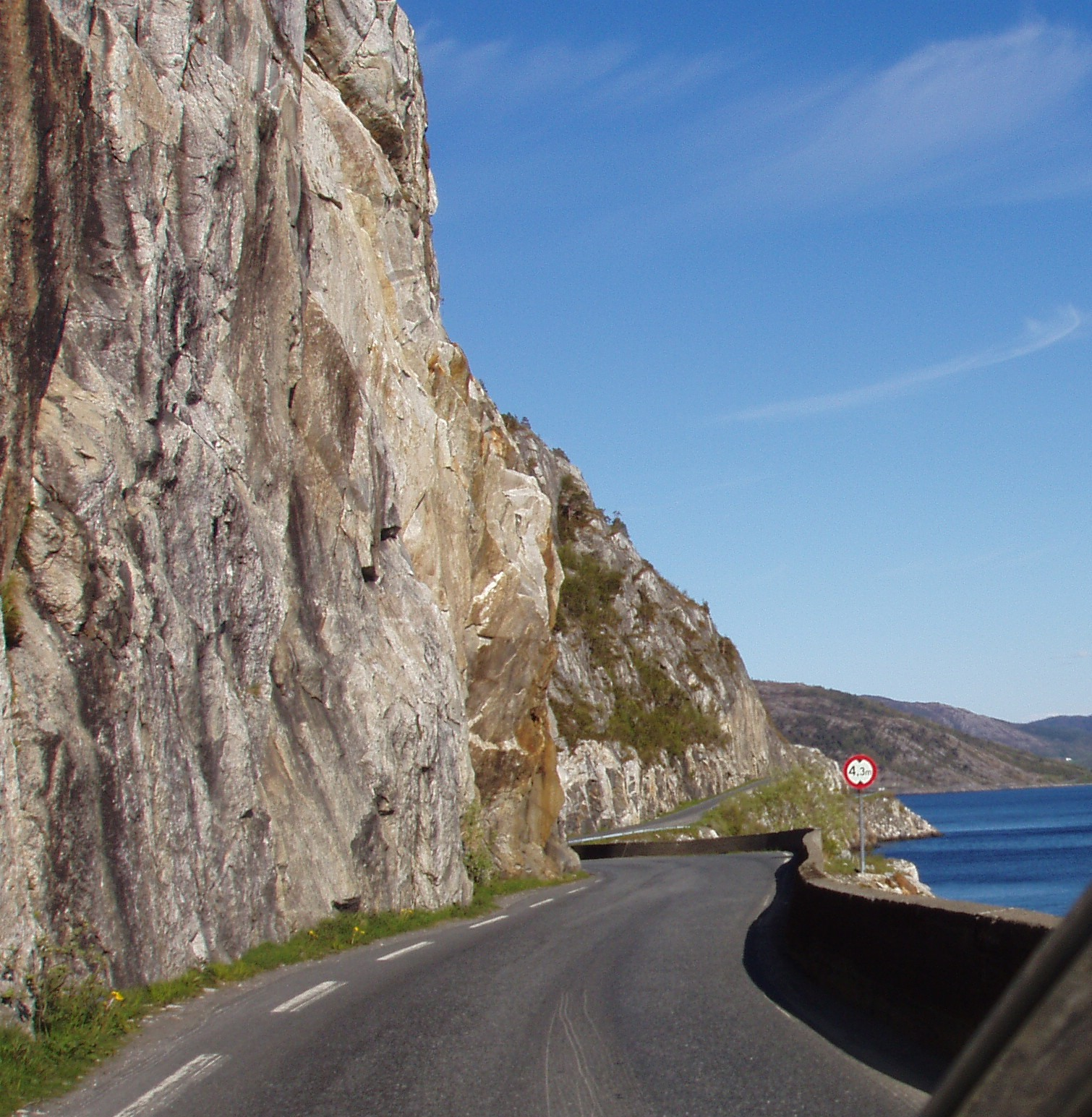 RV 78 along Vefsnfjorden, Vefsn, Norway